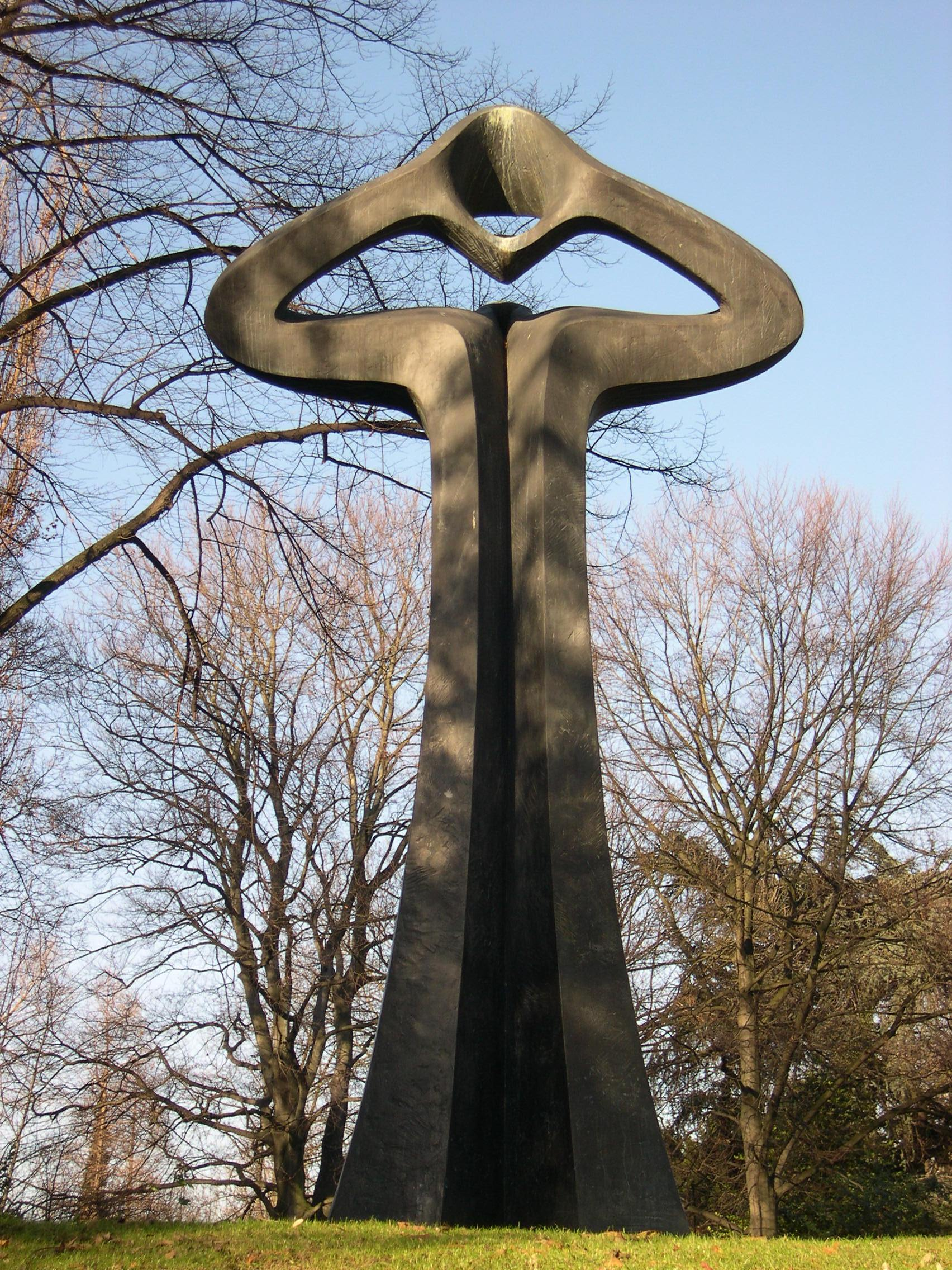 Der Mahner von Vadim Sidur (1985), gestiftet von Udo van Meeteren, im Düsseldorfer Hofgarten.